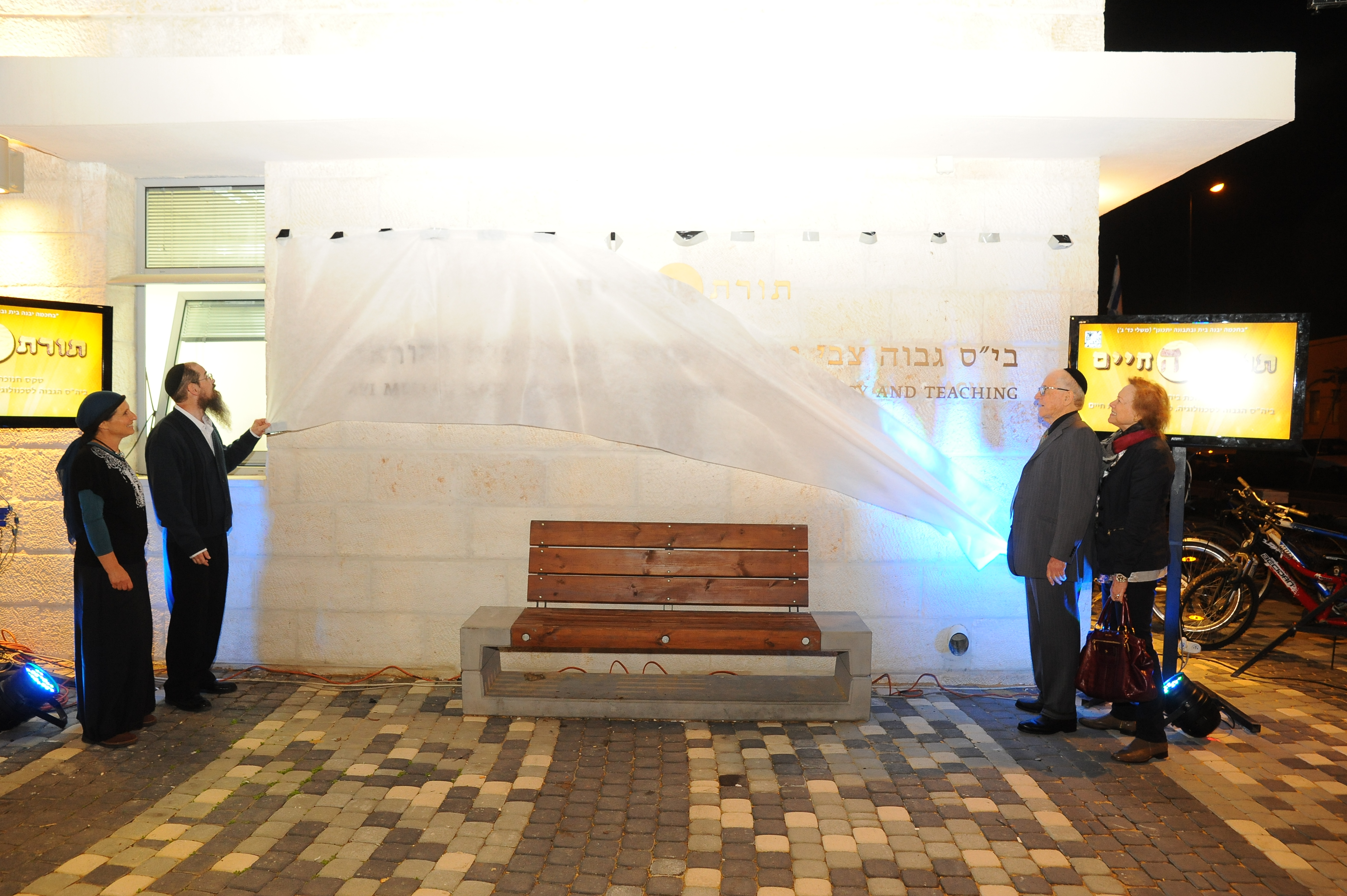 טקס חנוכת בית צבי מיתר - תורת החיים ביד בנימין. מימין לשמאל: עפרה מיתר, צבי מיתר, הרב שמואל טל, הרבנית יפעת טל.